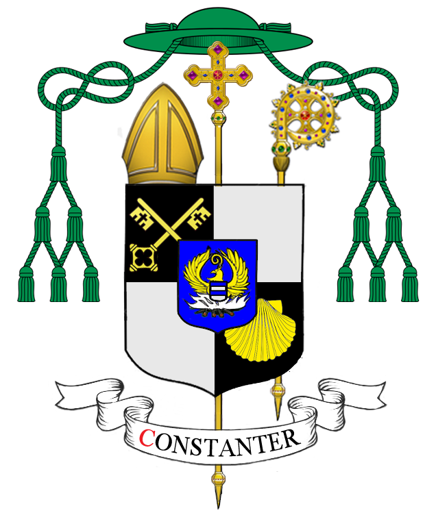 Wapenschild van Oscar Joliet